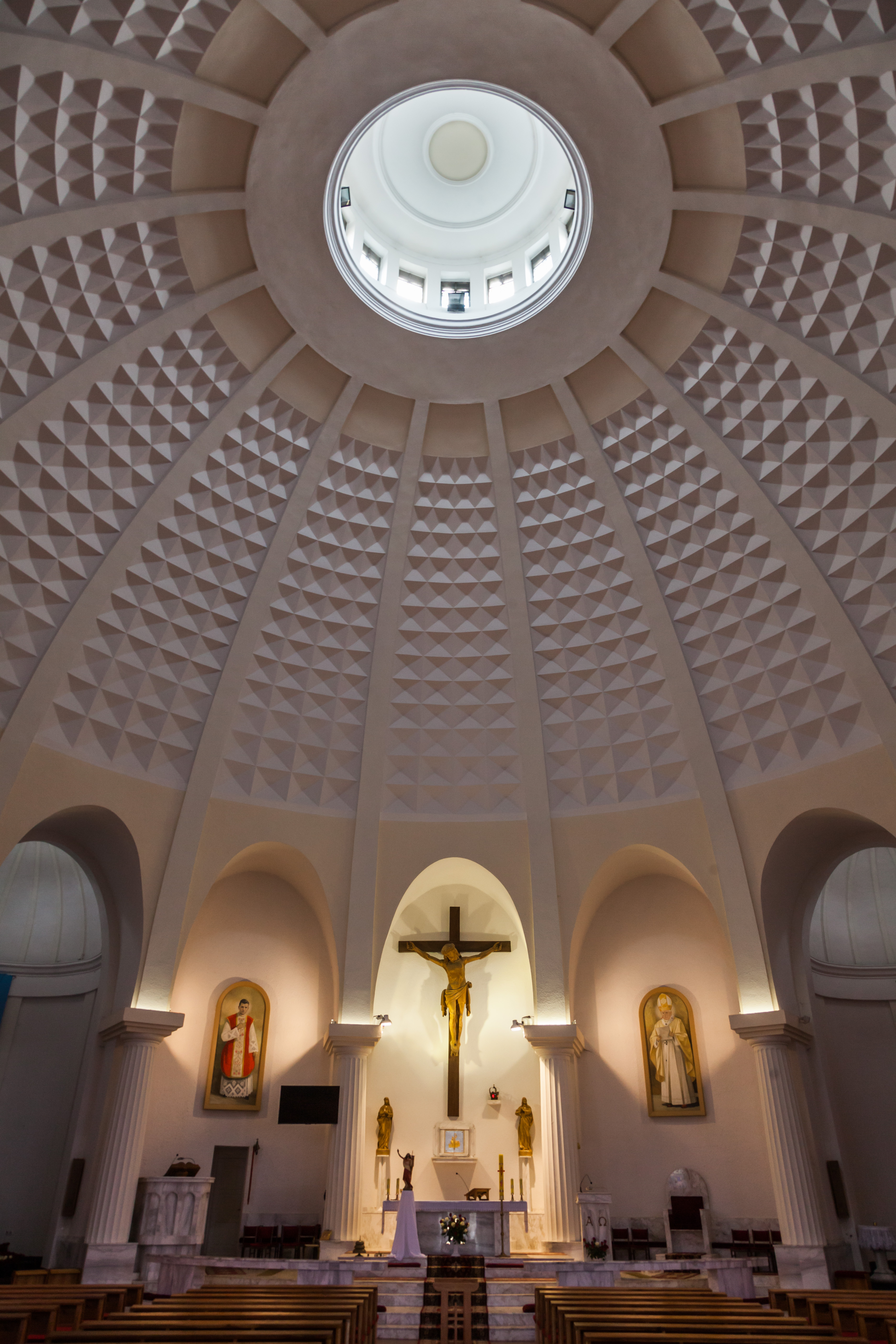 Toruń, kościół pw. Chrystusa Króla, 1929-1930, proj. Kazimierz Ulatowski.